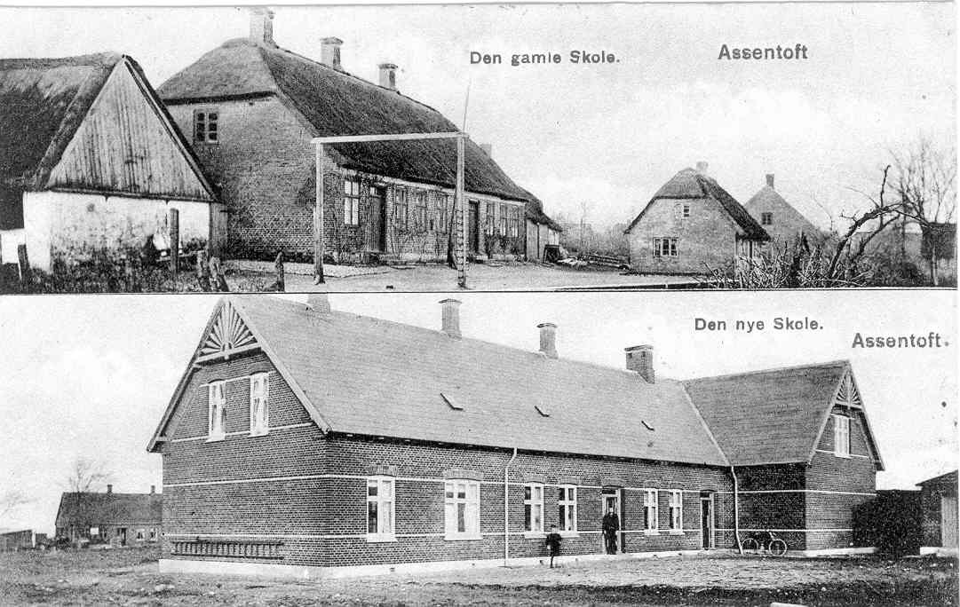 Assentoft gamle og nye skole, Assentoft.